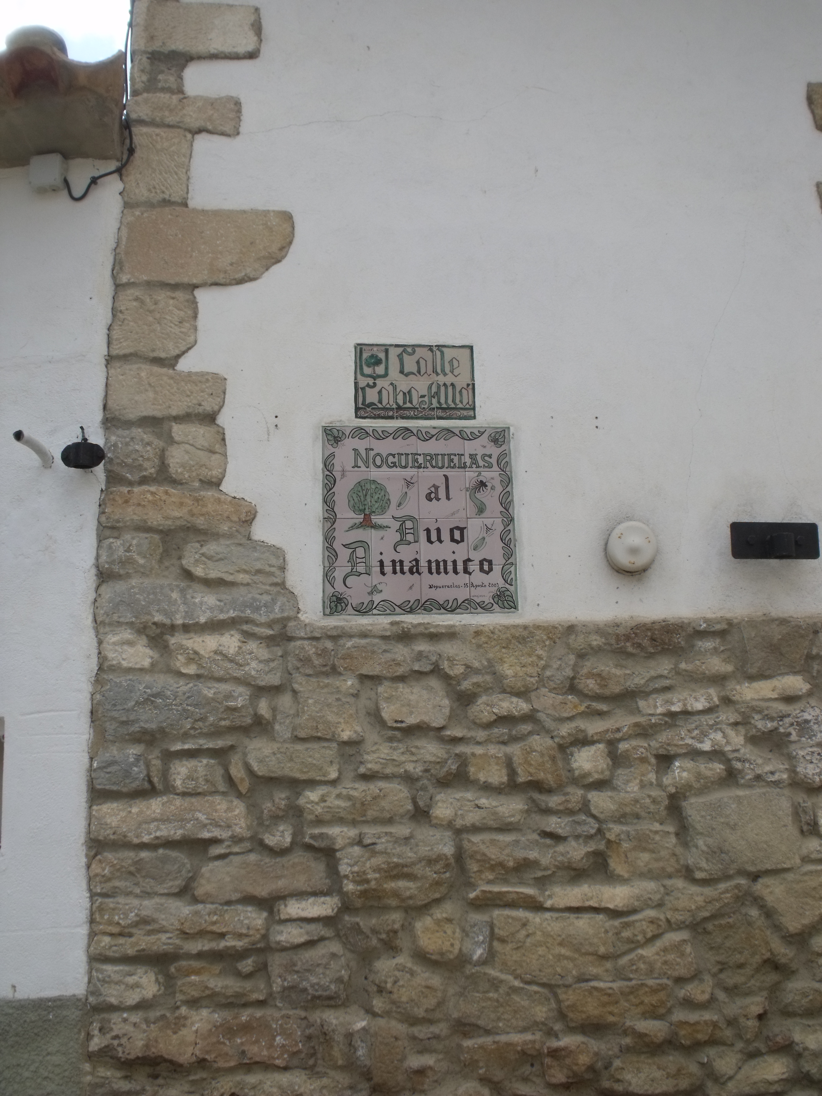 placas calle